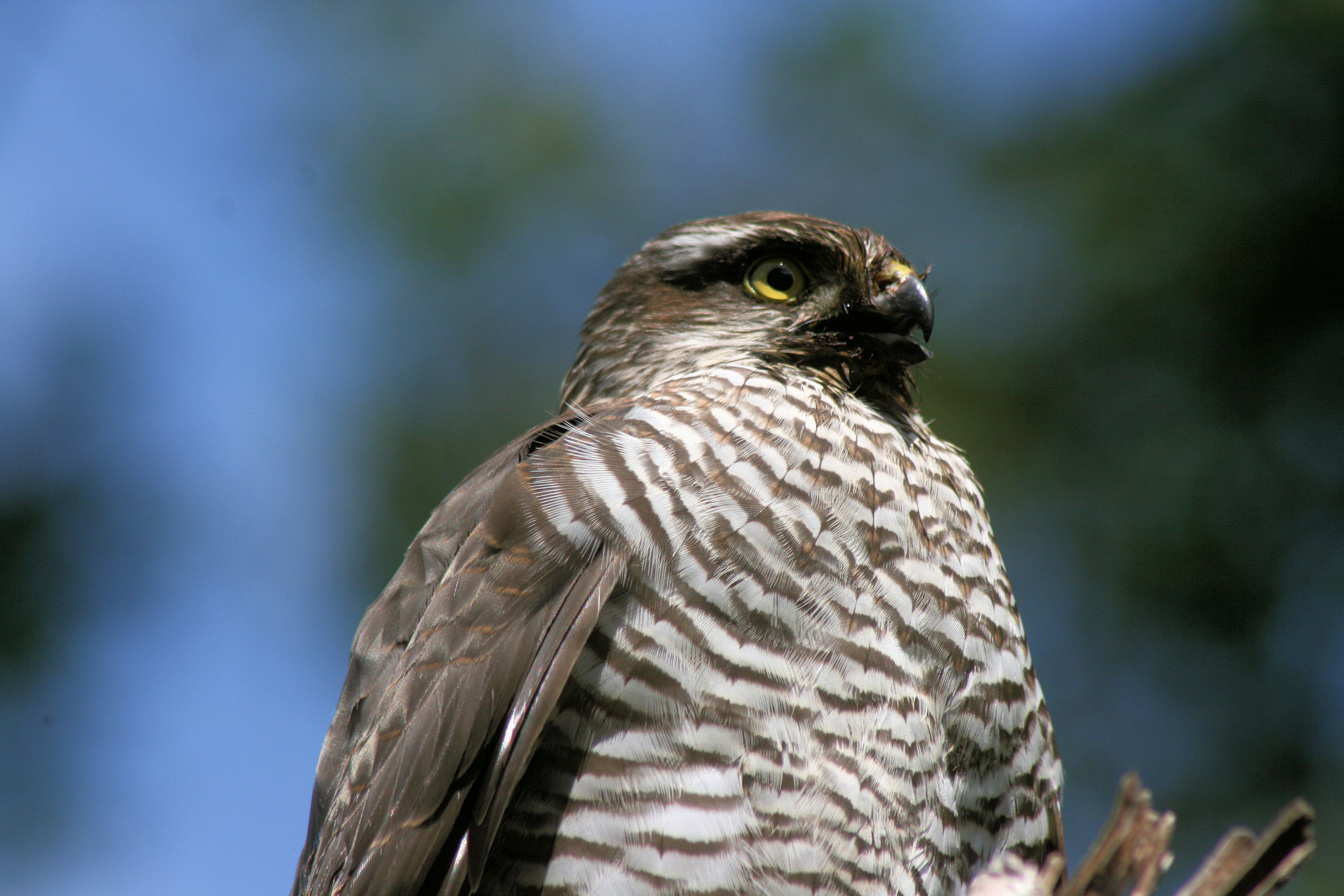 Sperberweibchen